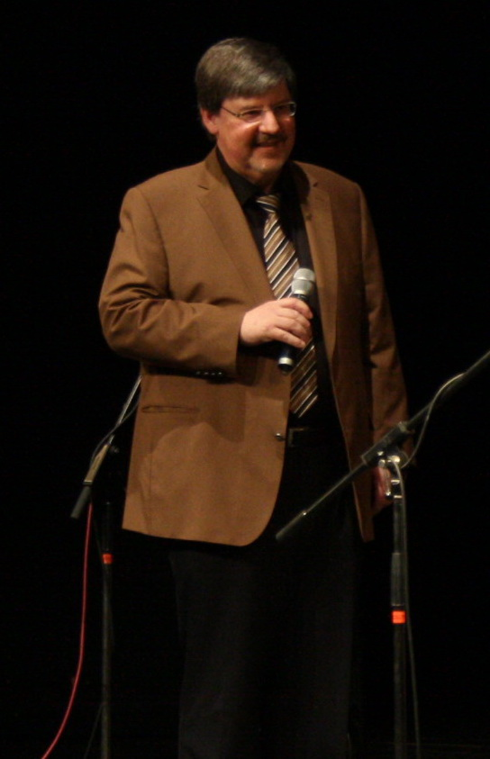 Alfons Schweiggert bei der Verleihung des Großen Valentinpreises im Münchner Volkstheater.